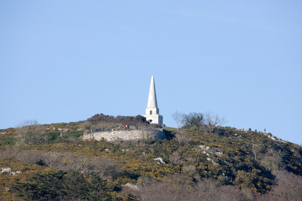 KILLINEY - COUNTY DUBLIN